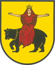 Herb miasteczka Magierów